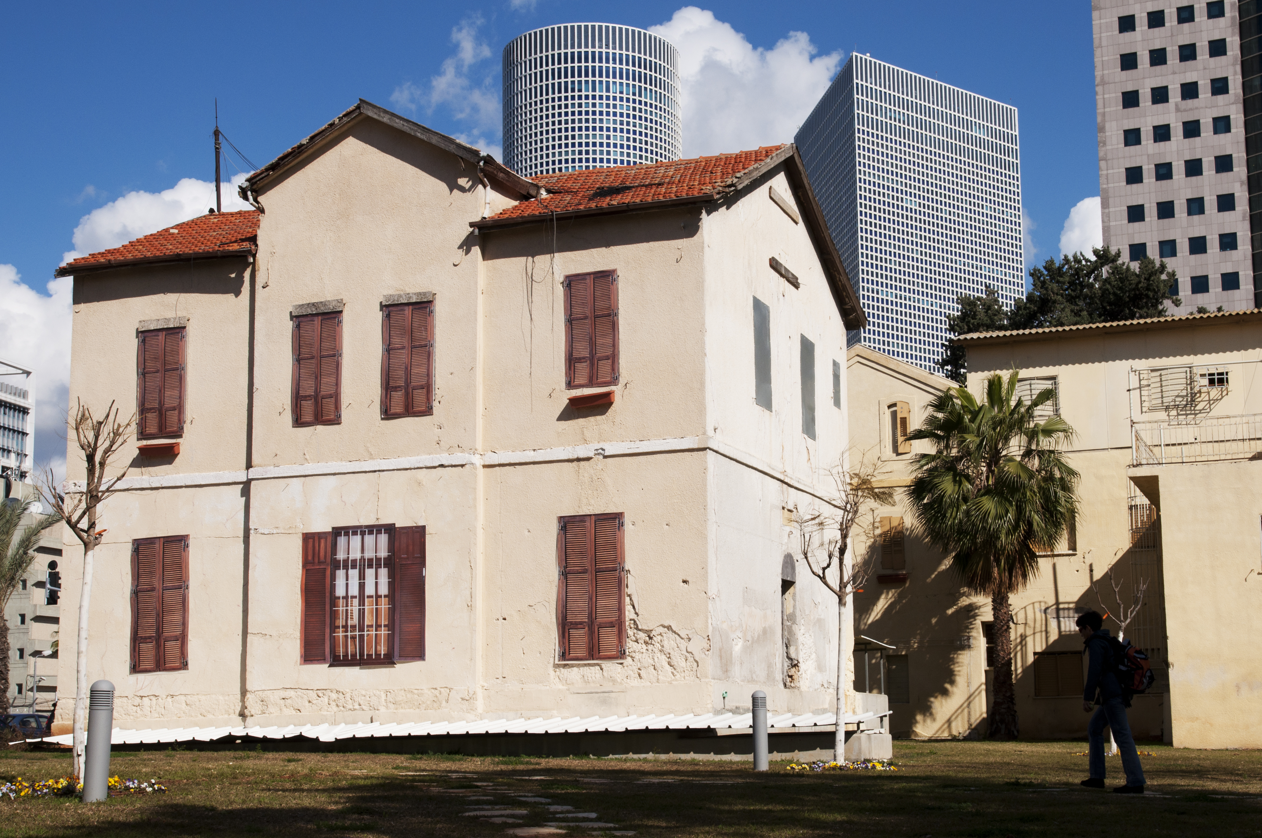 שׂרונה היא המושבה הרביעית שהקימו הגרמנים הטמפלרים בארץ ישראל במחצית השנייה של המאה ה-19. המושבה הוקמה ארבעה קילומטרים צפונית ליפו, ואחרוני בתיה שוכנים כיום בתל אביב בין שדרות שאול המלך מצפון, דרך בגין במזרח, רחוב הארבעה מדרום, ומגרשי החנייה של אחוזות החוף ממערב. מקצתם נמצאים היום בתוך בסיס הקריה.להיכנס